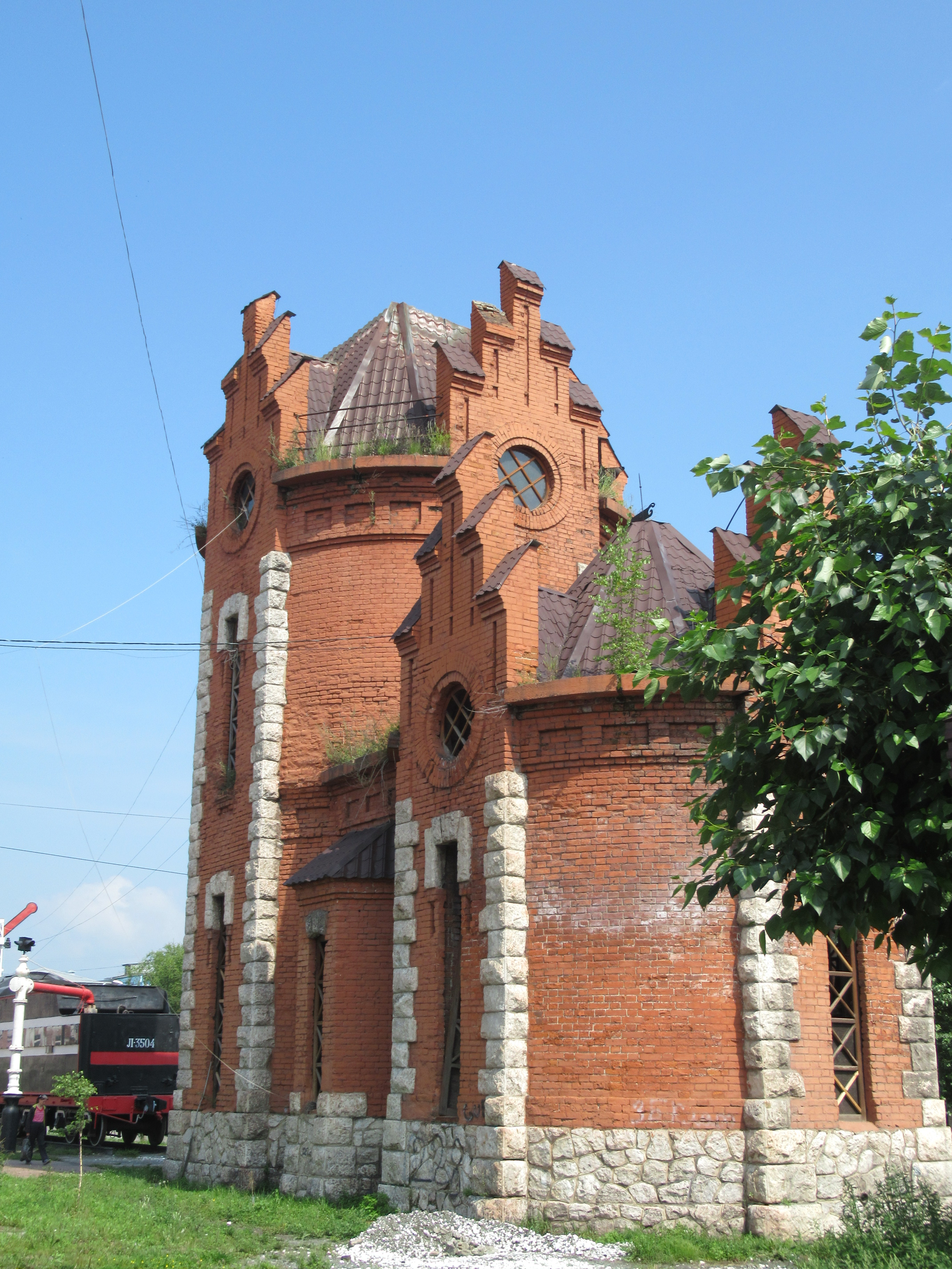 Водонапорная башня: улица Советская, 44, Слюдянка, Слюдянский район, Иркутская область